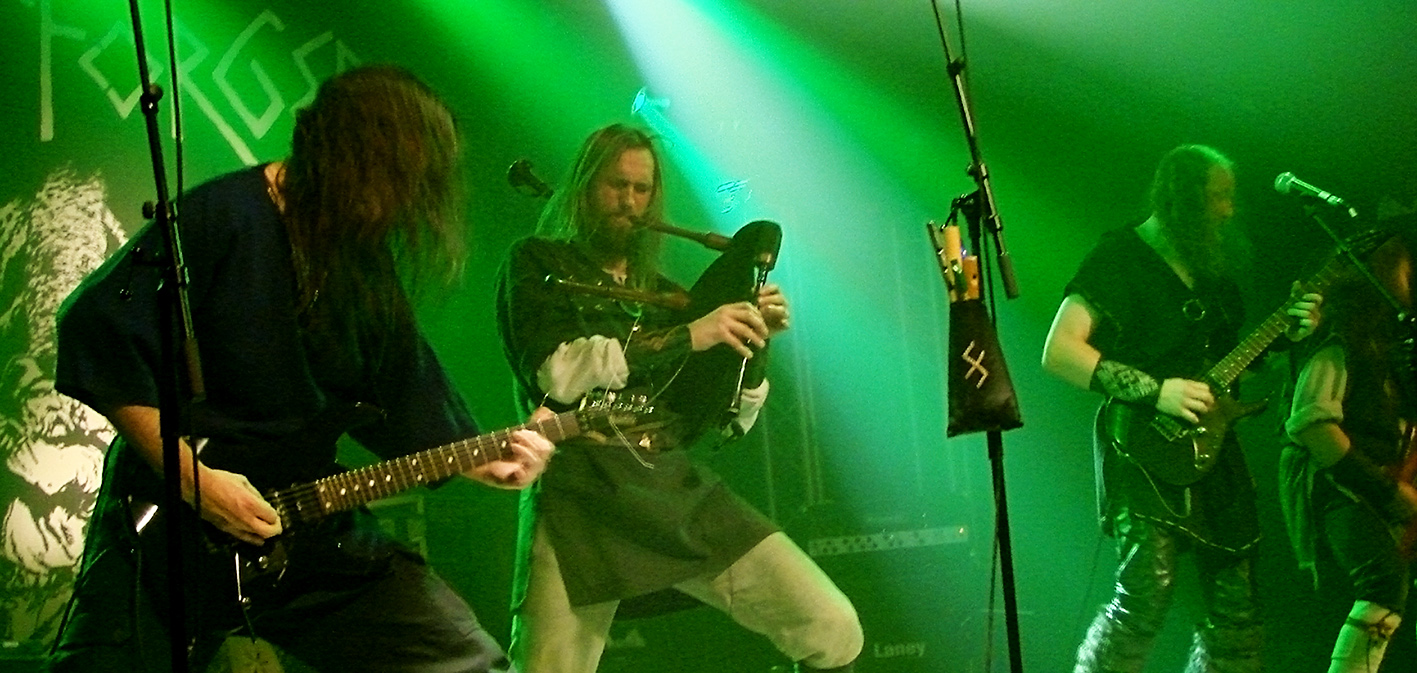 Skyforger au Cernunnos Fest 07, le 16/12/07 à la Locomotive, Paris. Skyforger est un groupe de Pagan Folk Metal letton.